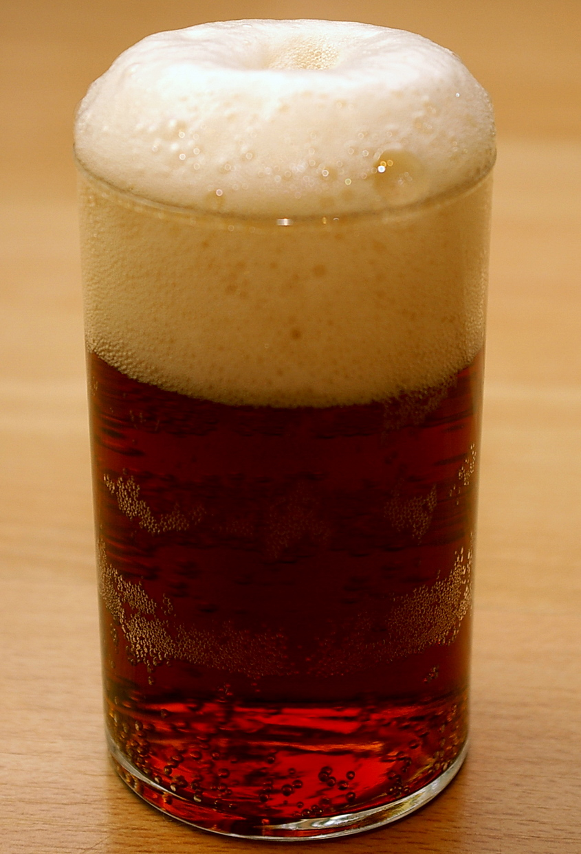 Altbier in Düsseldorf-Oberbilk